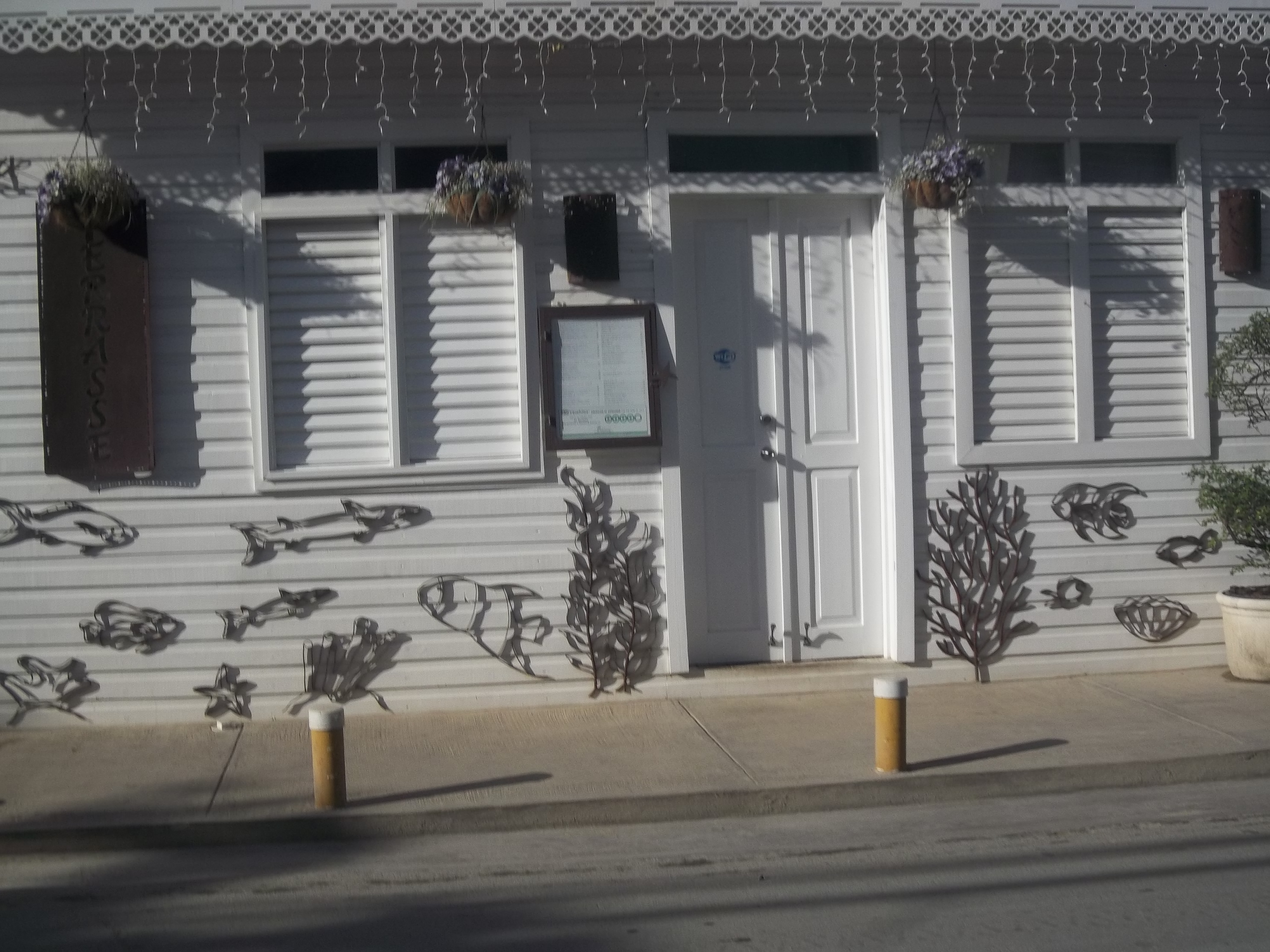 hermoso restaurante